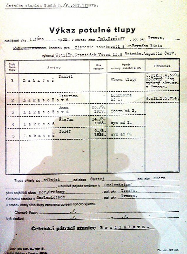 Cigáni počas Prvej Československej republiky museli vykazovať svoj pohyb po území republiky.